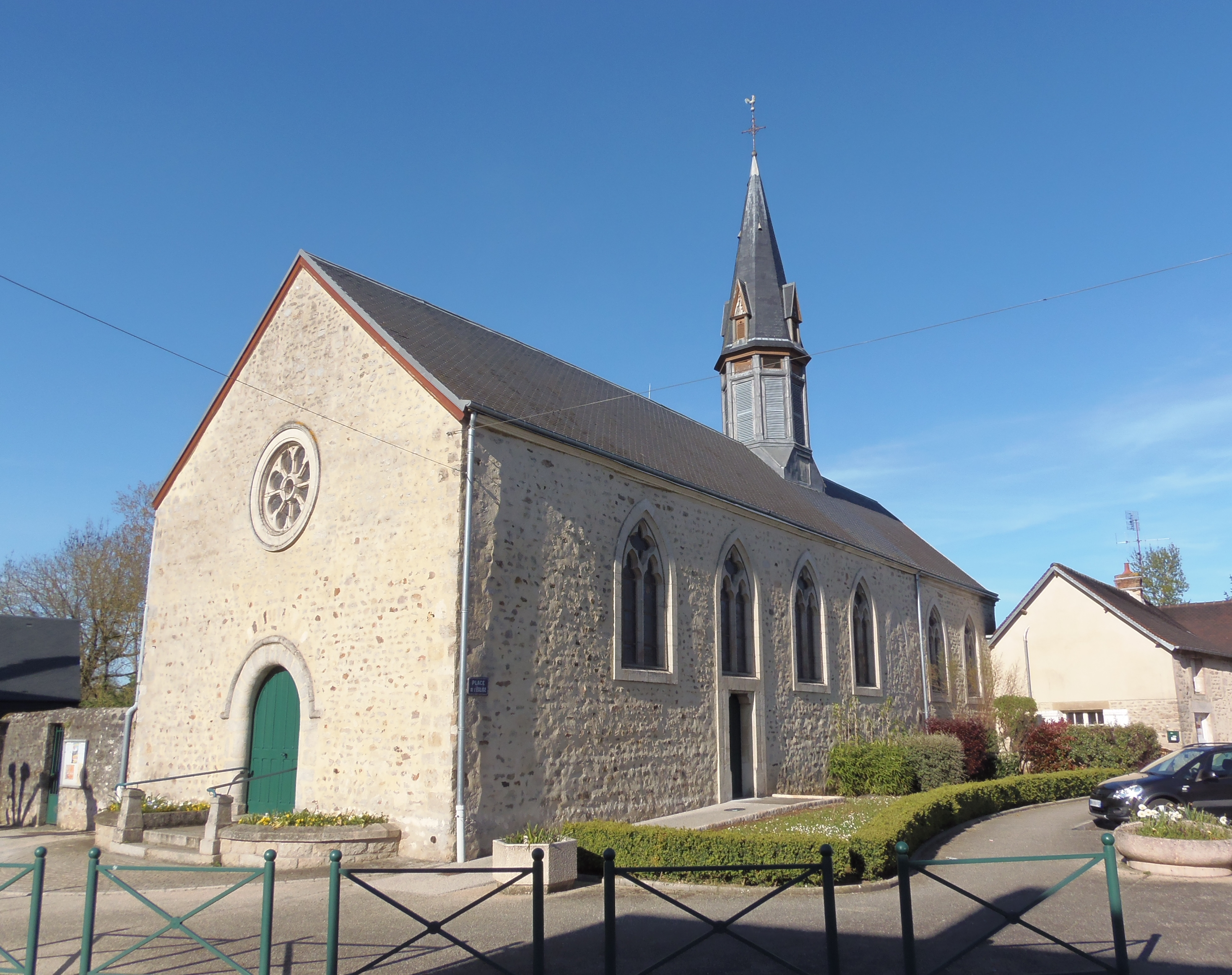 Saint-Germain-du-Corbéis (Normandie, France). L'église Saint-Germain.